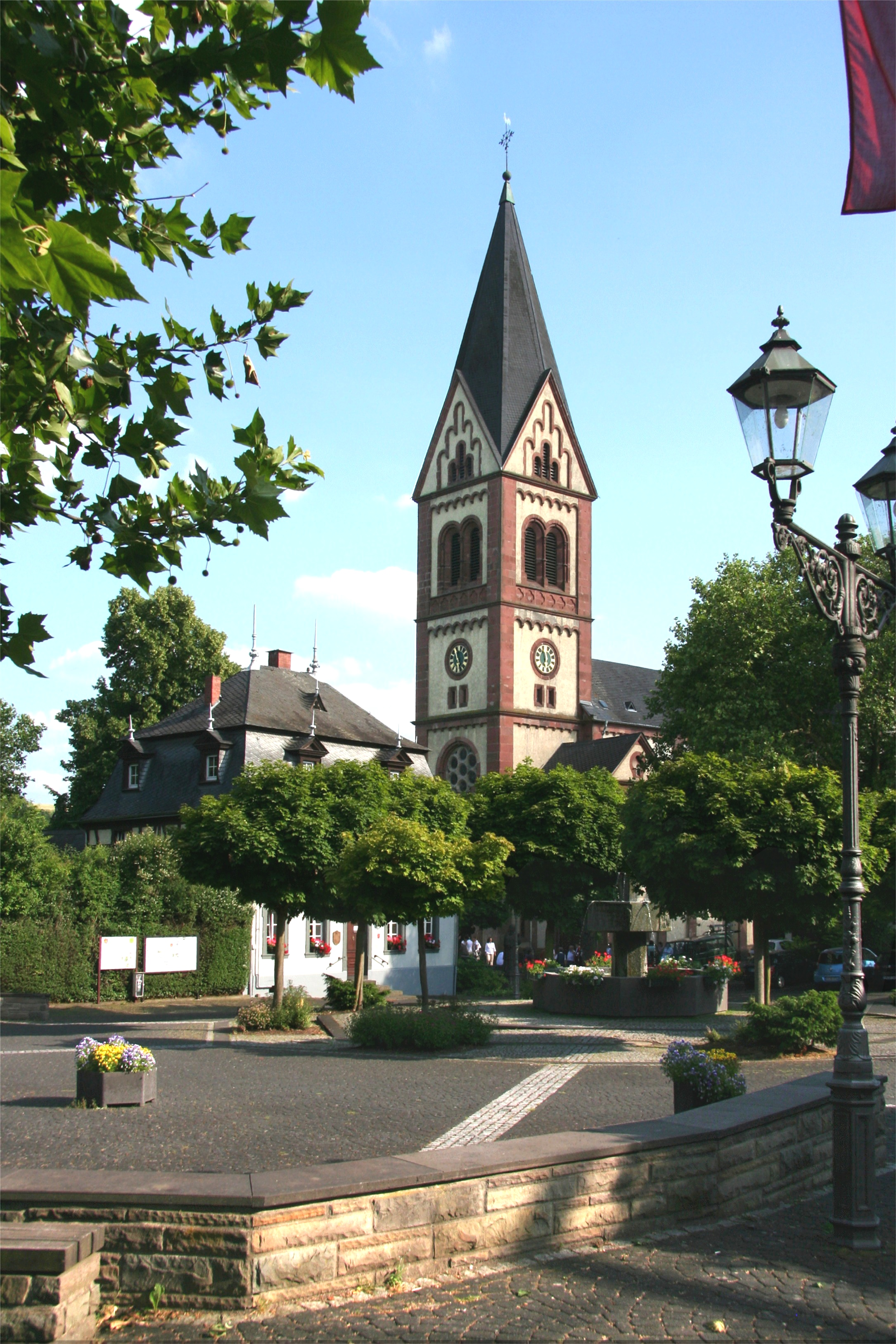 Bassenheim – Walpotplatz und Kirchturm von St. Martin